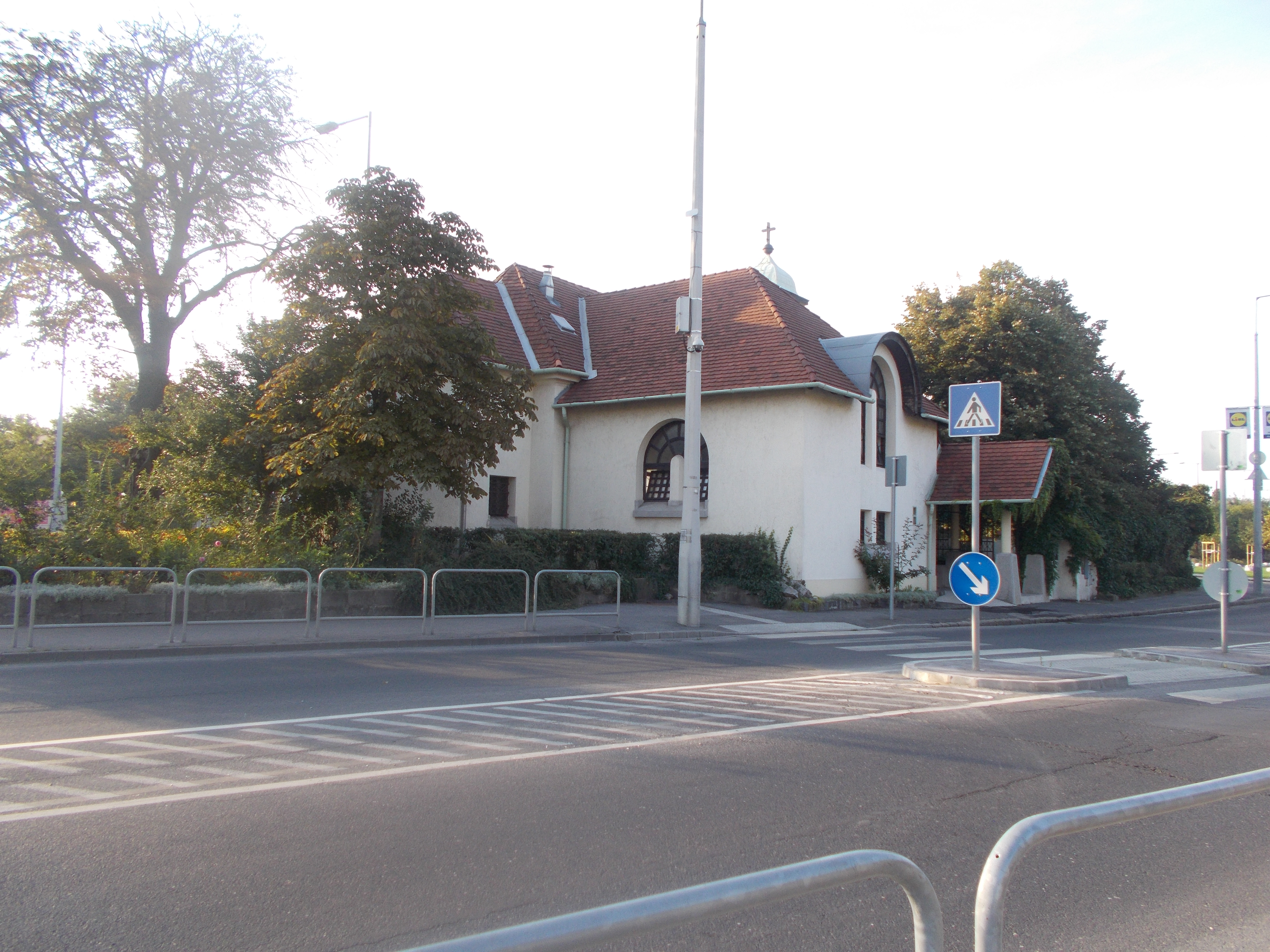 A Kövi Szűz Mária-templom Kaszásdűlőn